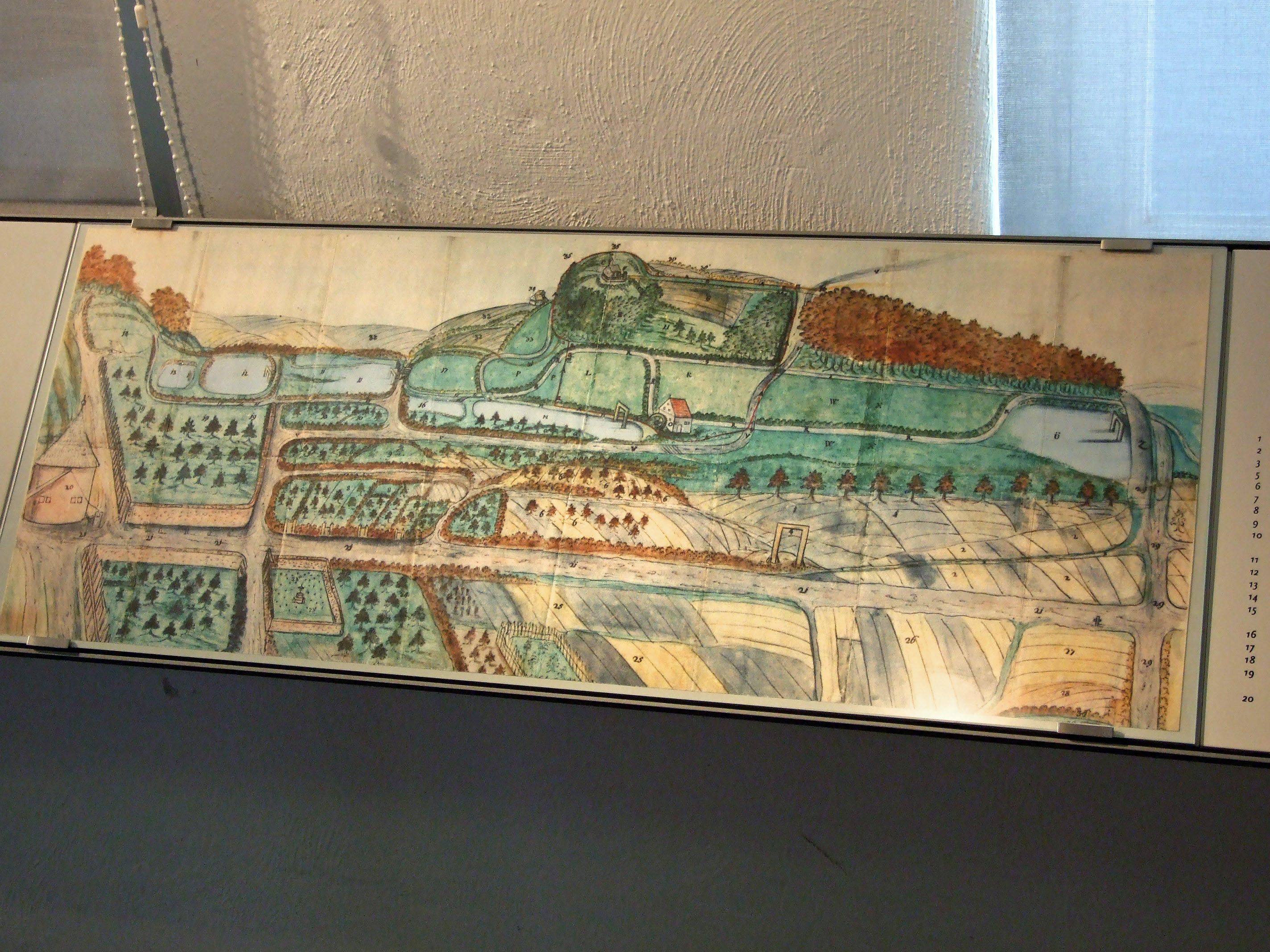 Gebietskarte um 1700, im Kronberger Burgmuseum, Kronberg Ts.